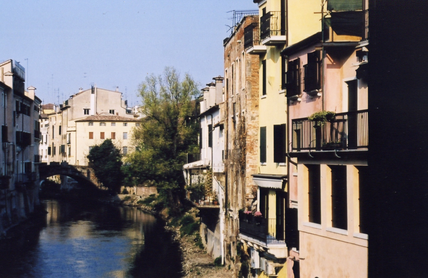 Padua Photo G Larson